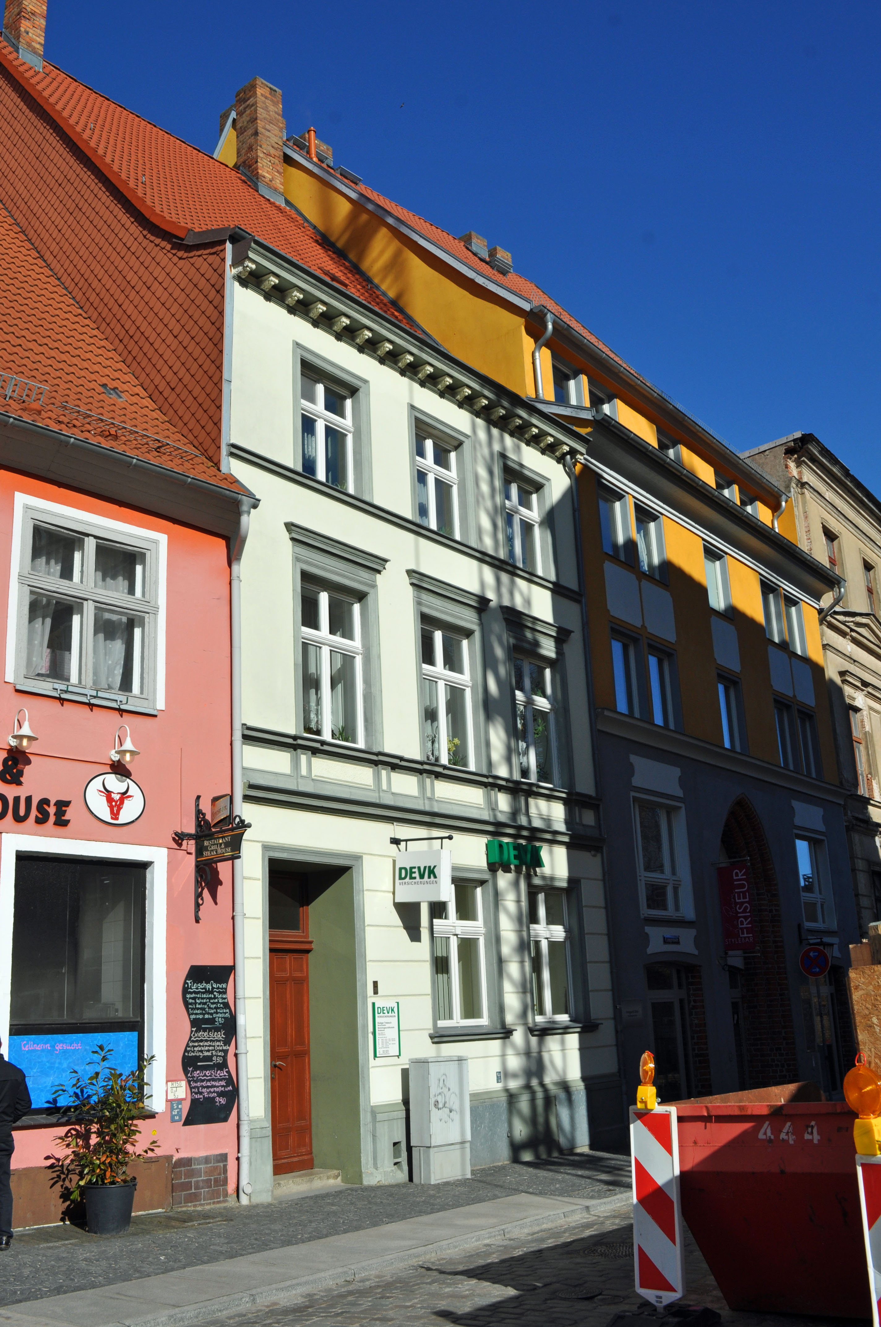 Gebäude bzw. Gebäudedetail in Stralsund. Straße und Hausnummer siehe Dateiname. Das Gebäude ist als Baudenkmal ausgewiesen, siehe dazu die Liste der Baudenkmale in Stralsund.